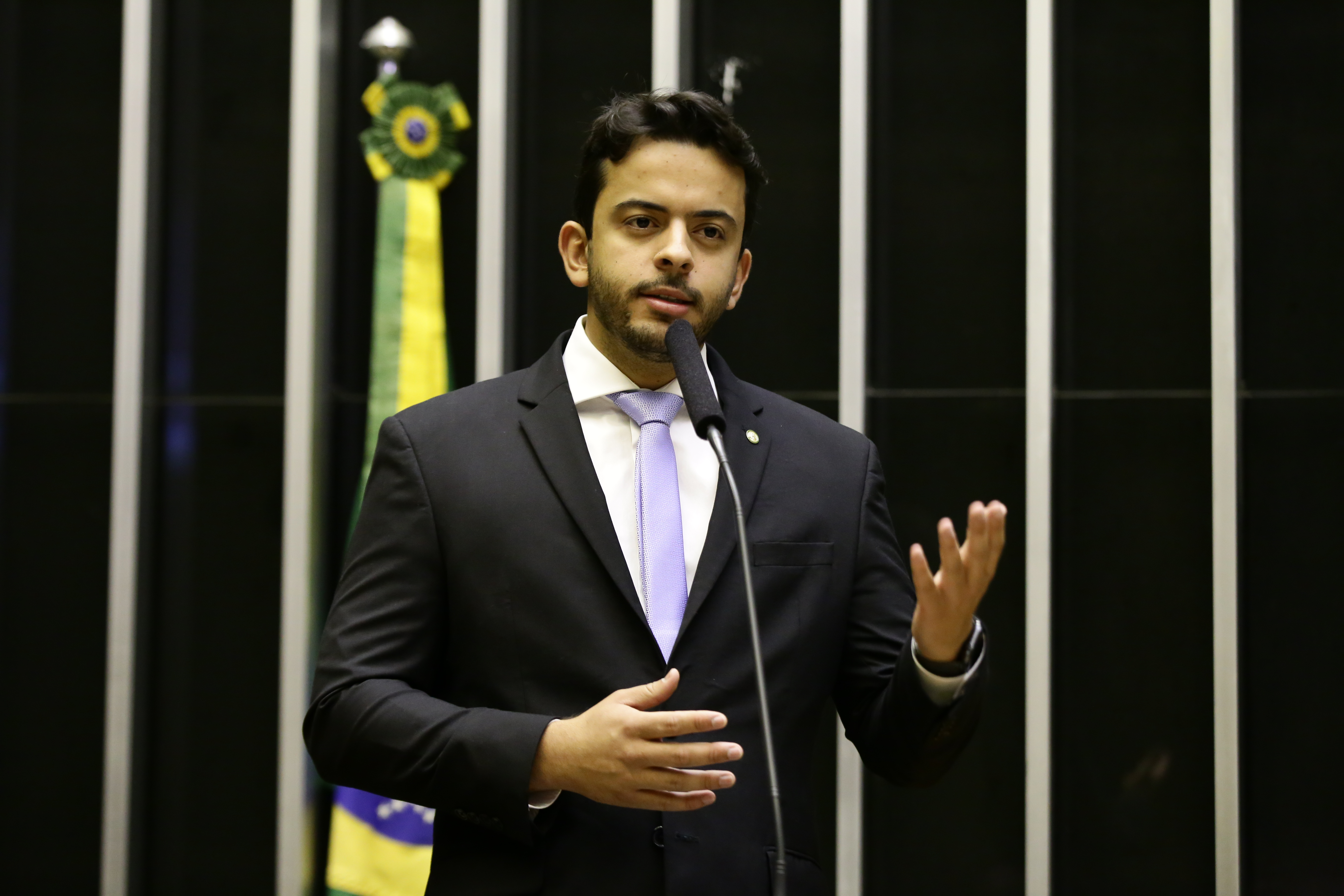 Imagem do deputado discursando no Plenário da Câmara